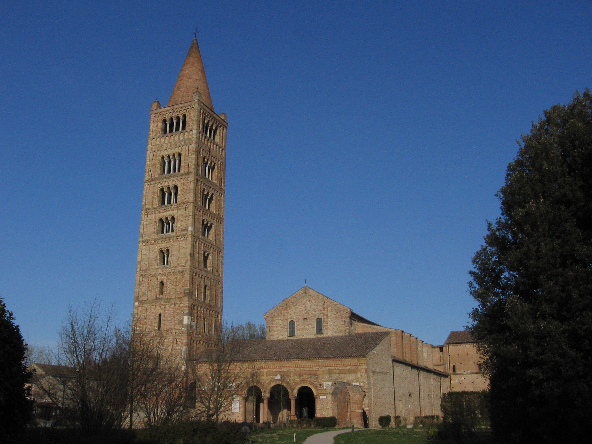 Pomposa